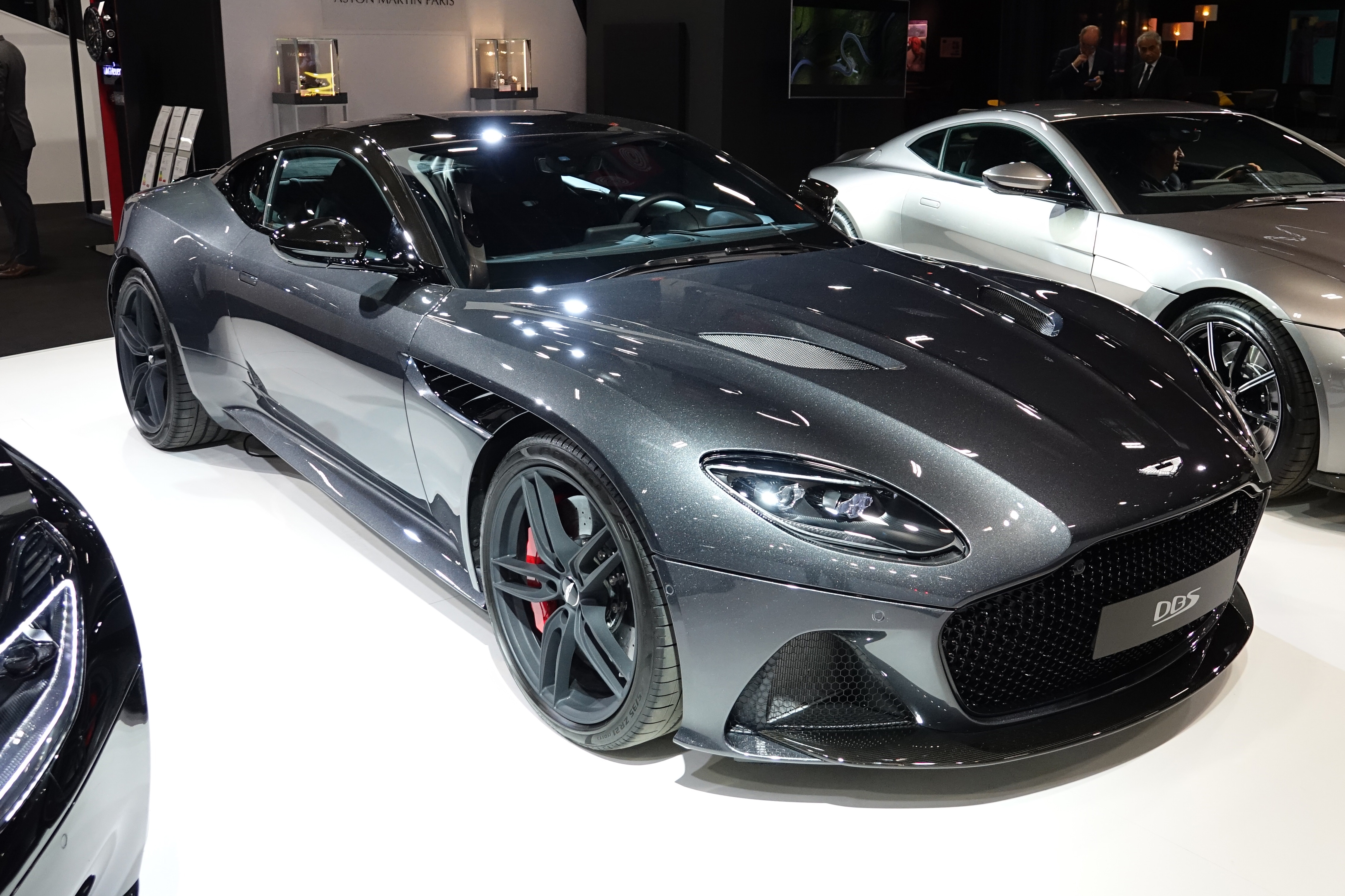 Aston Martin DBS Superleggera au Mondial Paris 2018